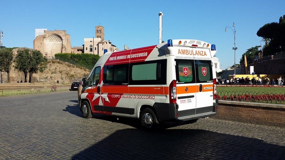 Servizio per la sfilata del 2 giugno